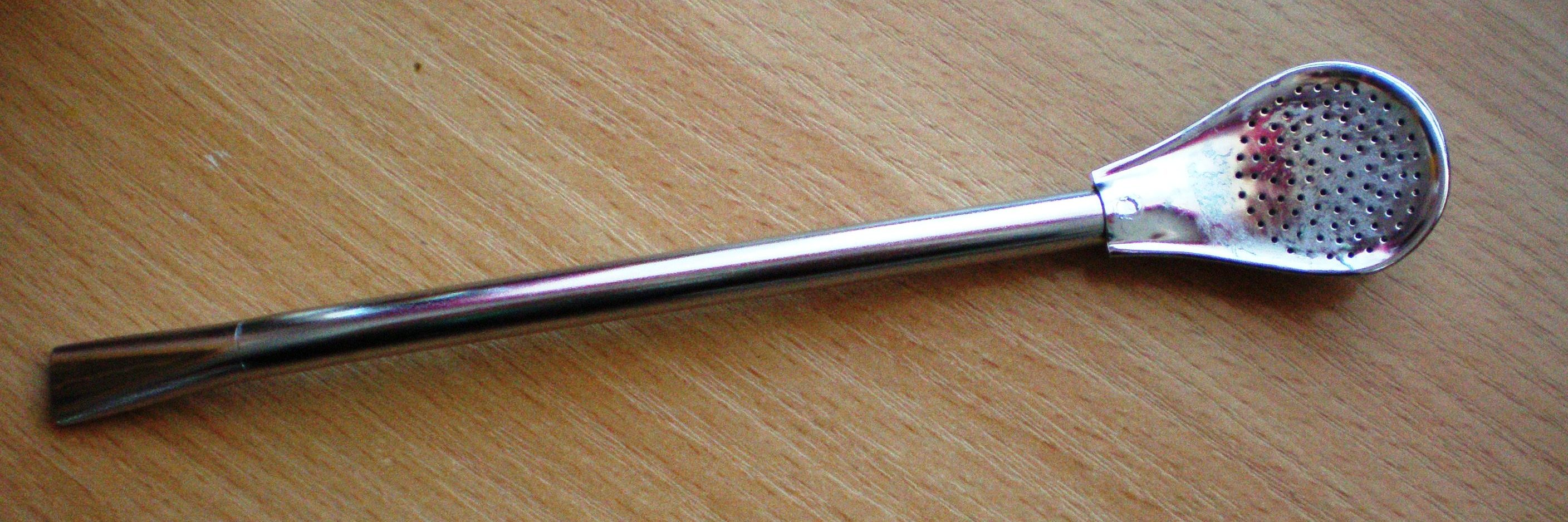 Bombilla para mate de Paraguay